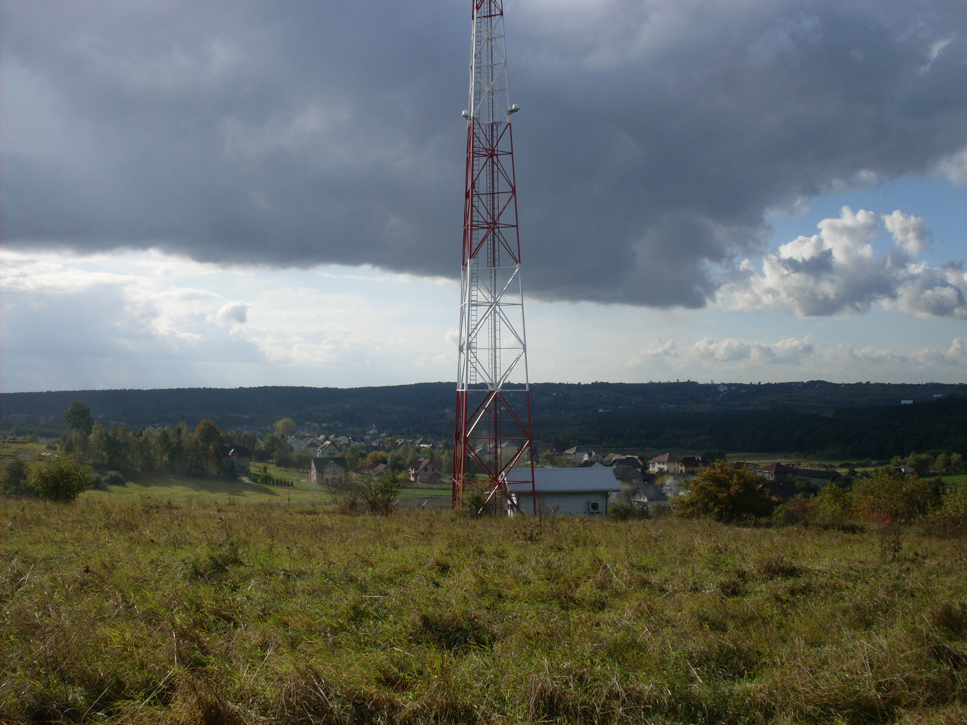 Zalas Podlesie. Widok Z Liguniowej Góry